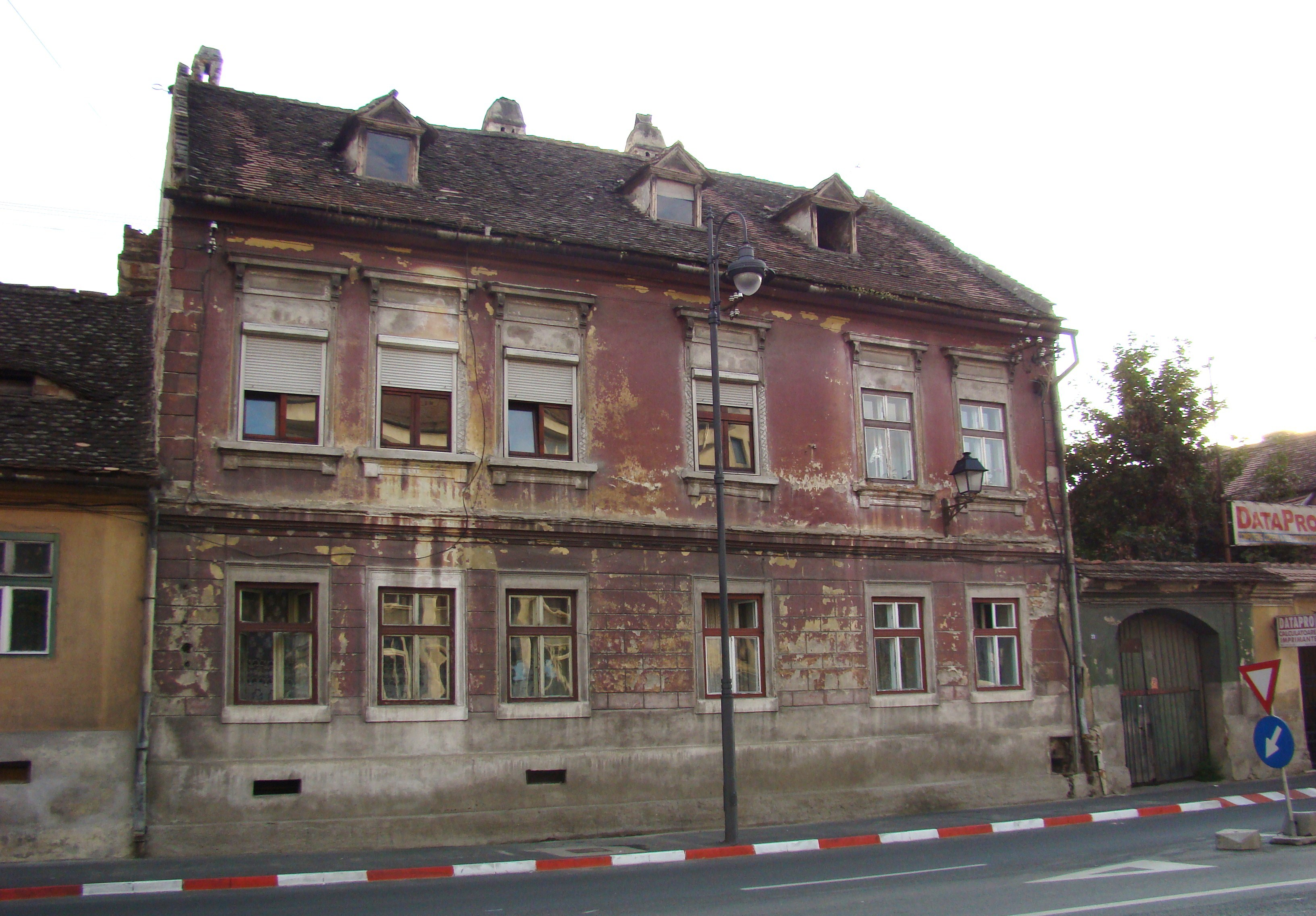 Clădire monument istoric, str.Andrei Șaguna, nr.23